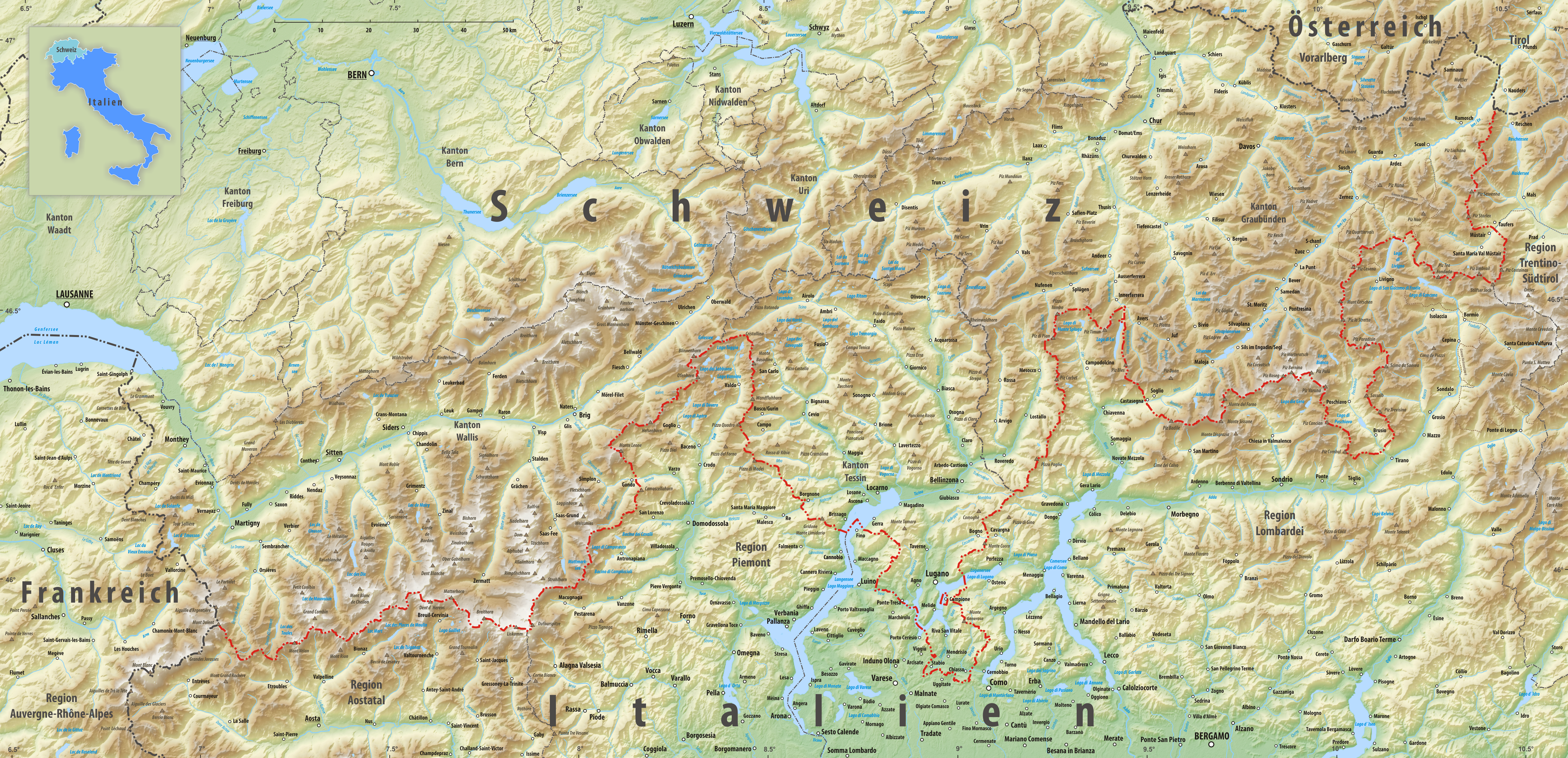 Reliefkarte des Grenzverlaufes zwischen der Schweiz und Italien Topographischer Hintergrund: NASA Shuttle Radar Topography Mission (public domain). SRTM3 v.2.